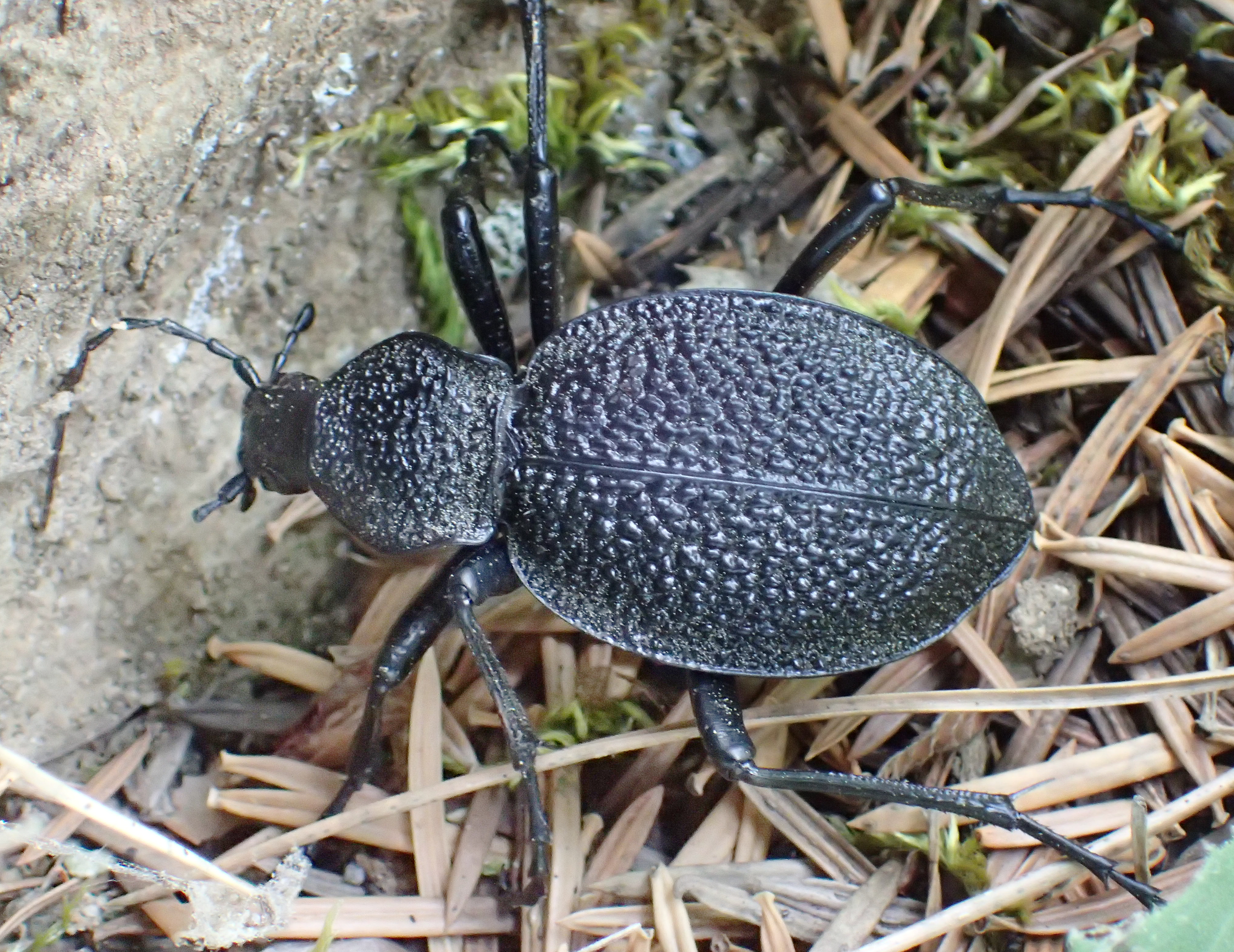 Carabus gigas aus Griechenland, Peloponnes, nördlicher Teil des Taygetos-Gebirges